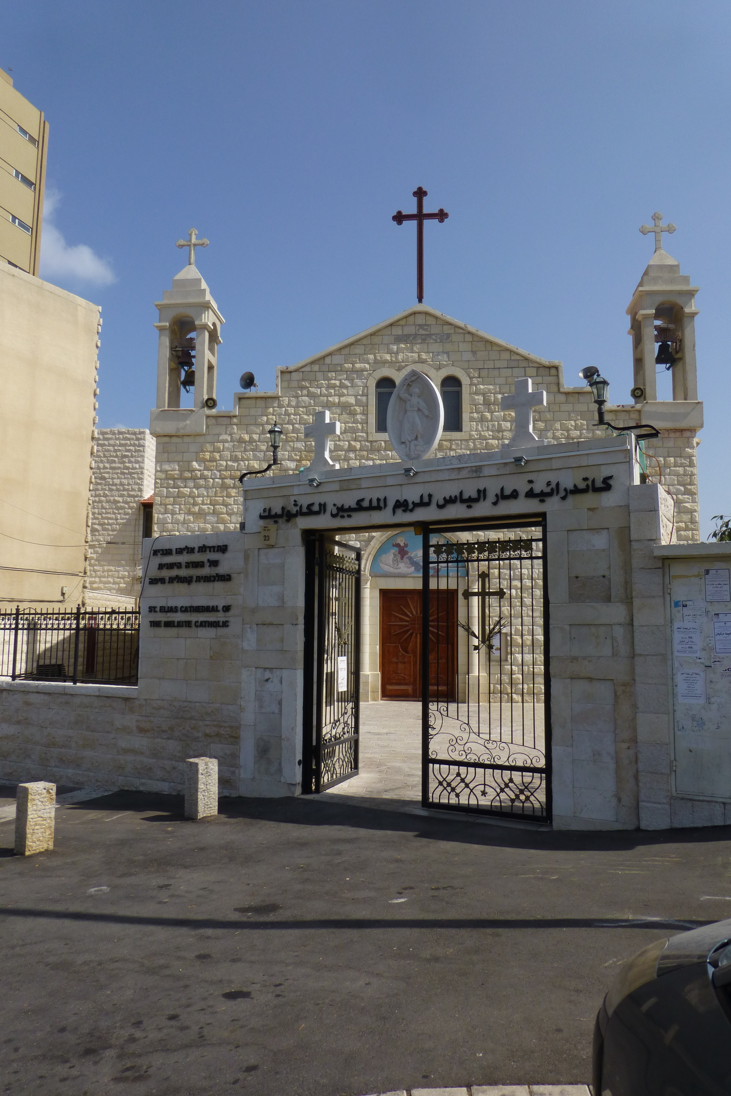 קתדרלת אליהו הנביא, המוכרת גם בשם קתדרלת מר אליאס, היא כנסייה יוונית-קתולית מלכיתית המוקדשת לאליהו הנביא, ואשר שוכנת ברחוב עין דור 23 בעיר התחתית שבחיפה. הקתדרלה משמשת כמקום מושבו של הארכיבישוף היווני-קתולי בעיר, העומד בראש הקהילה המלכיתית שהינה הקהילה הנוצרית הגדולה בחיפה.